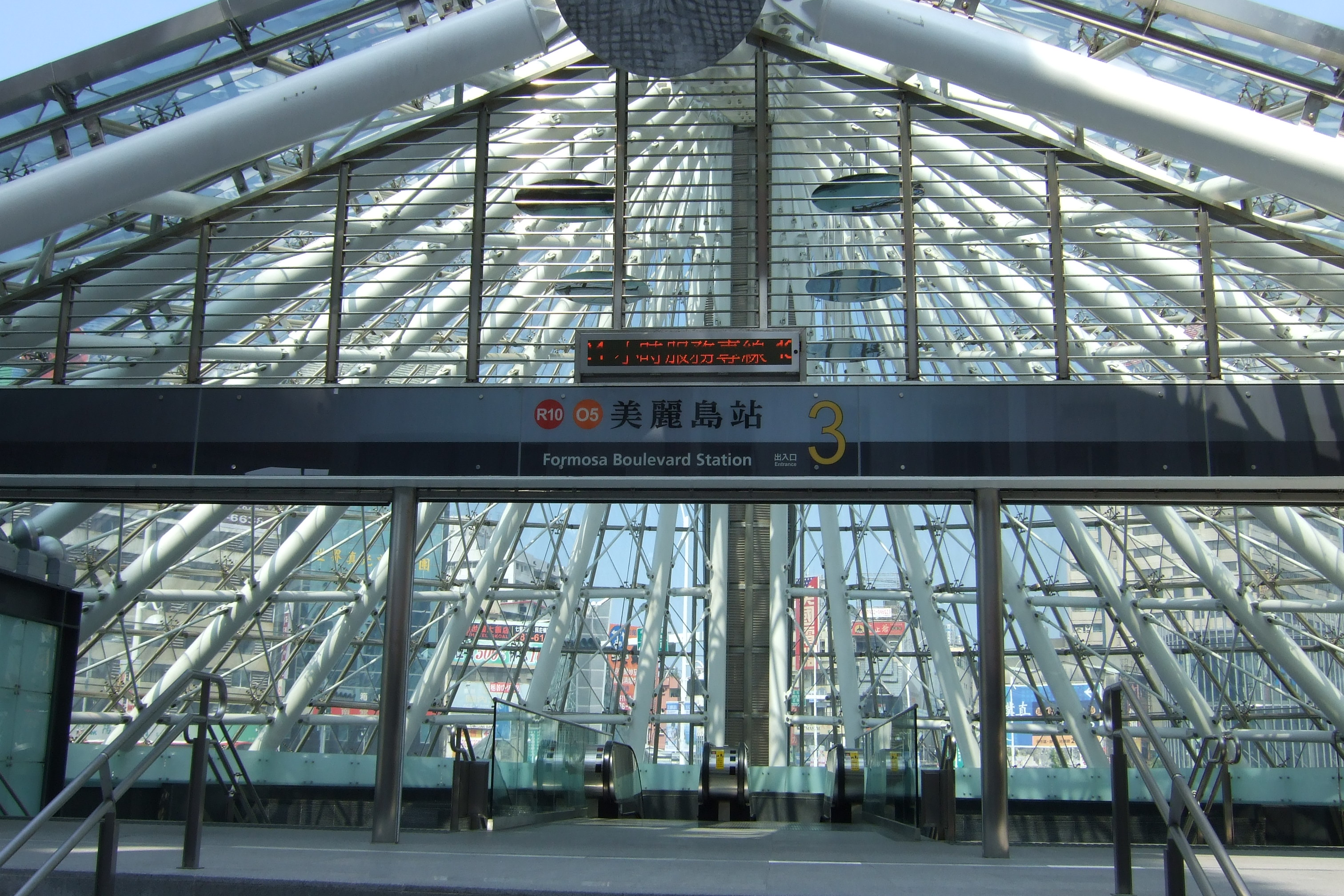 高雄捷運美麗島站出口3